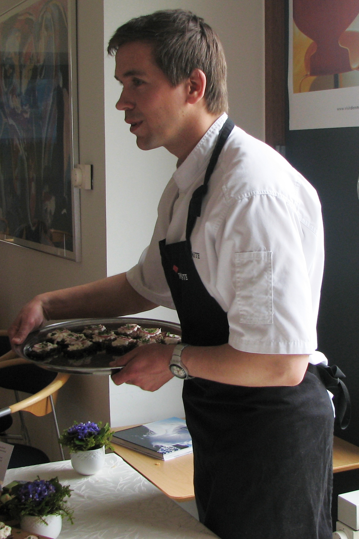 Telekokk Peeter Pihel 8. mail 2010 Taani saatkonnas